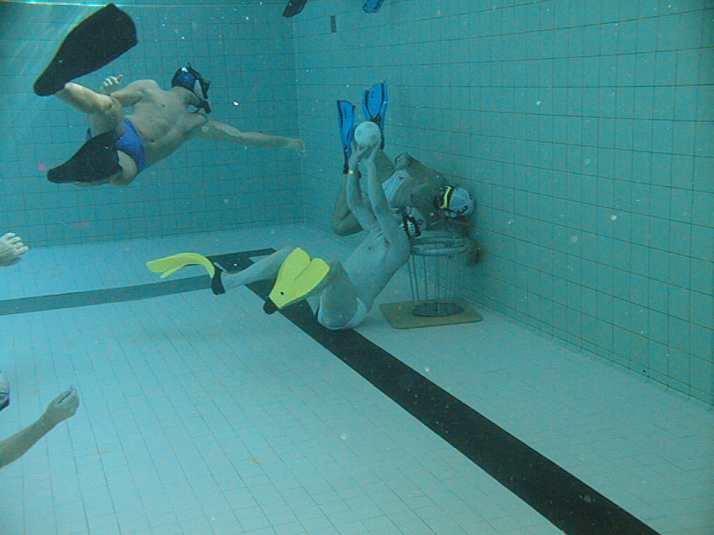 Unterwasser-Rugby beim TSC Lünen